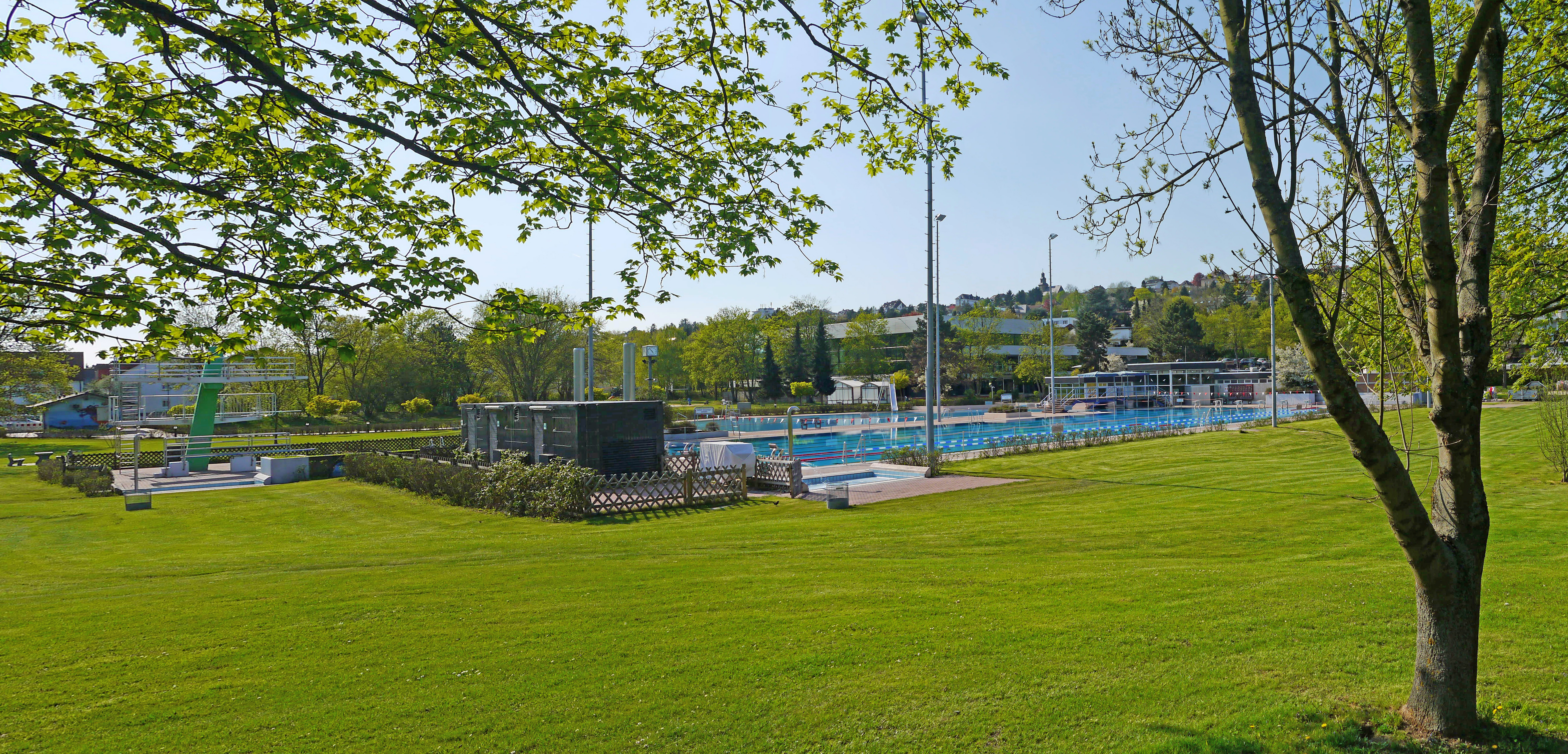 Das Riedbad, 2013 vor Eröffnung der Freibad-Saison in Frankfurt-Bergen-Enkheim.